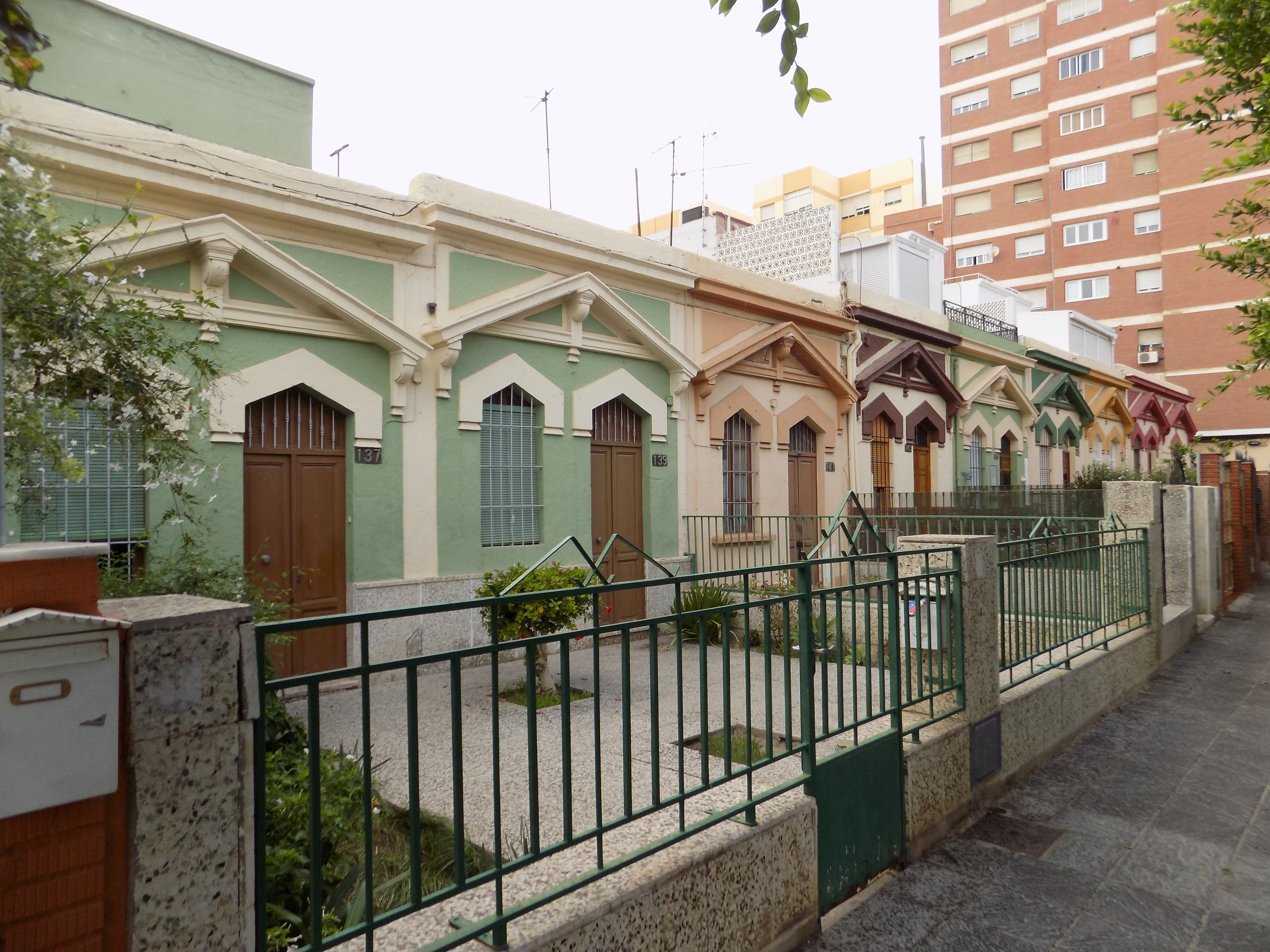 Casa de puerta y ventana en Almería